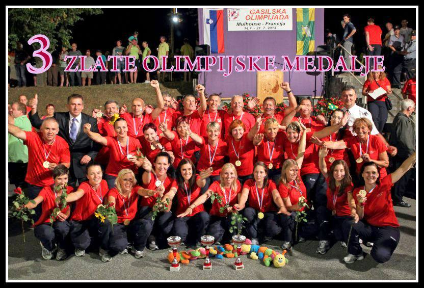 PGD Hajdoše